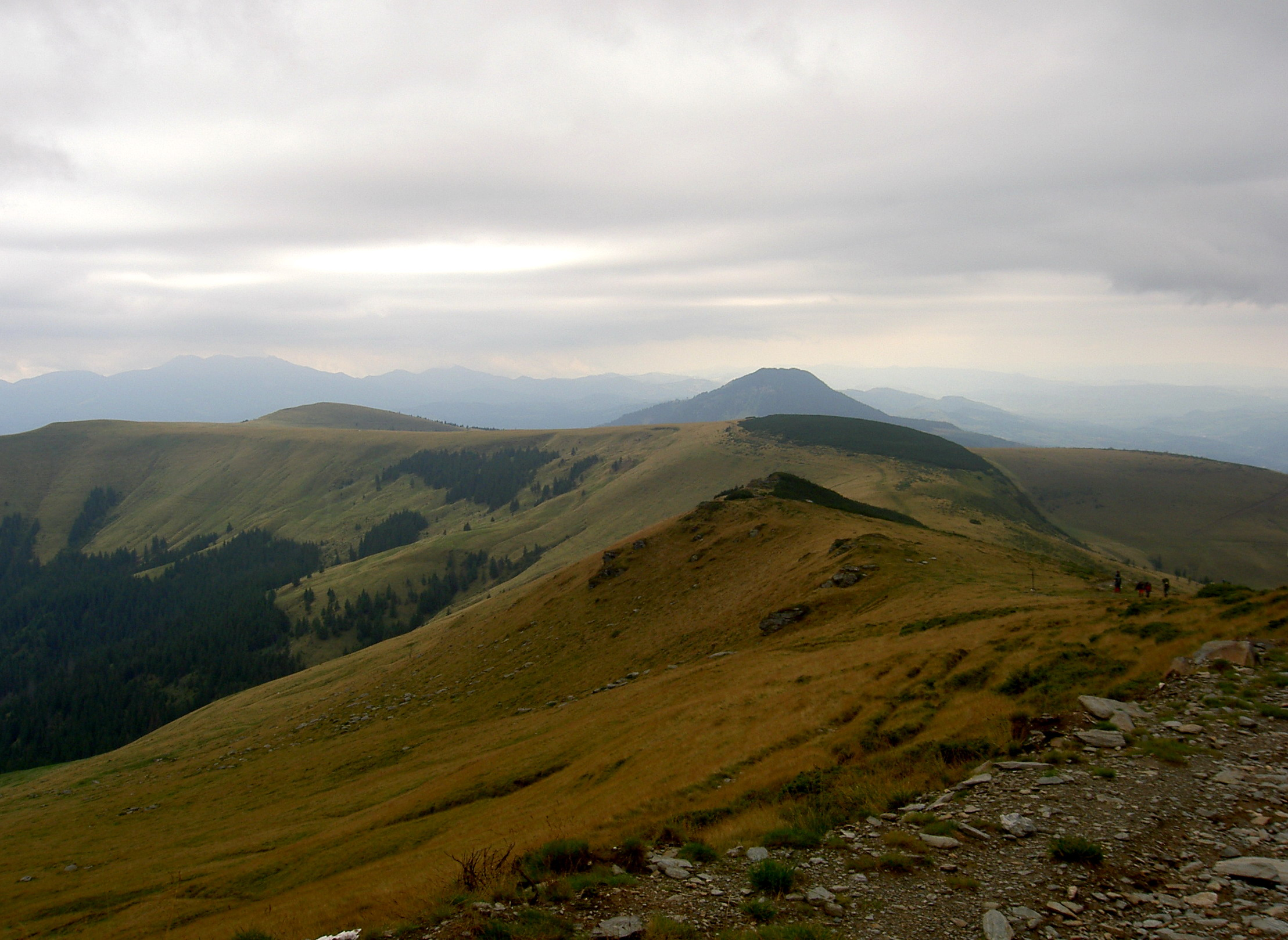 Rodna